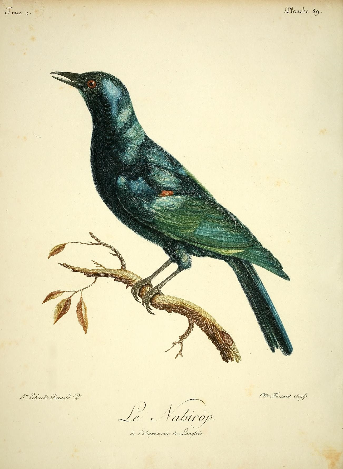 q.1 orne/ 2 iillauclK 89 J?J&Ue6&é*e£ @.° à I ,. , ^ ^ / amrop. Cfà çy'ejt/af^ eJcu/p.